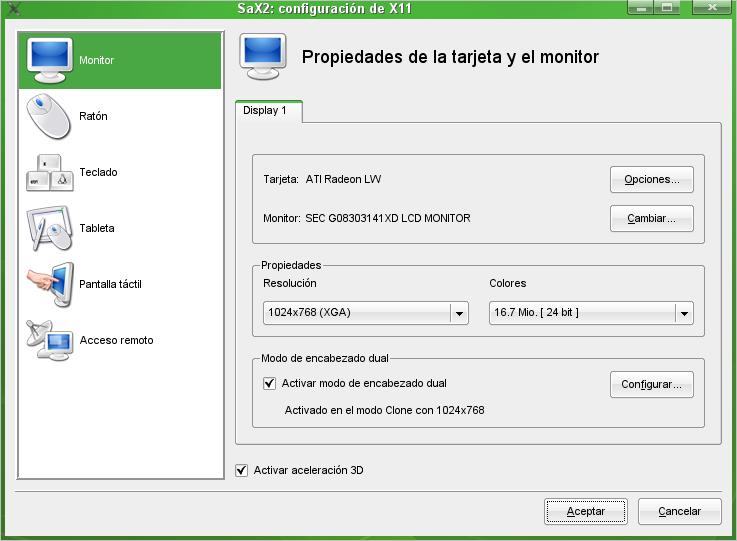 Captura de ventana de SaX2 en mi computador portátil.